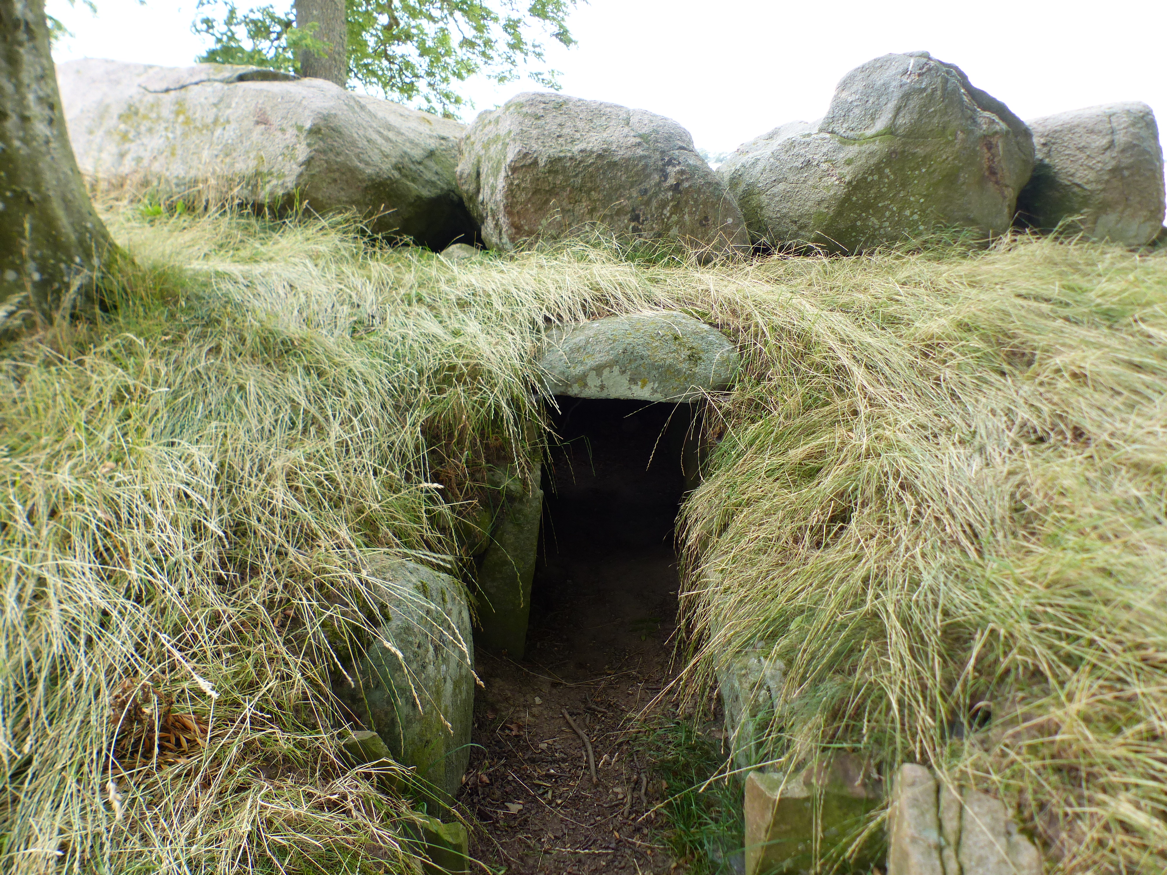 Lundestenen (Jættestue), Grabanlage, Nylars, Bornholm